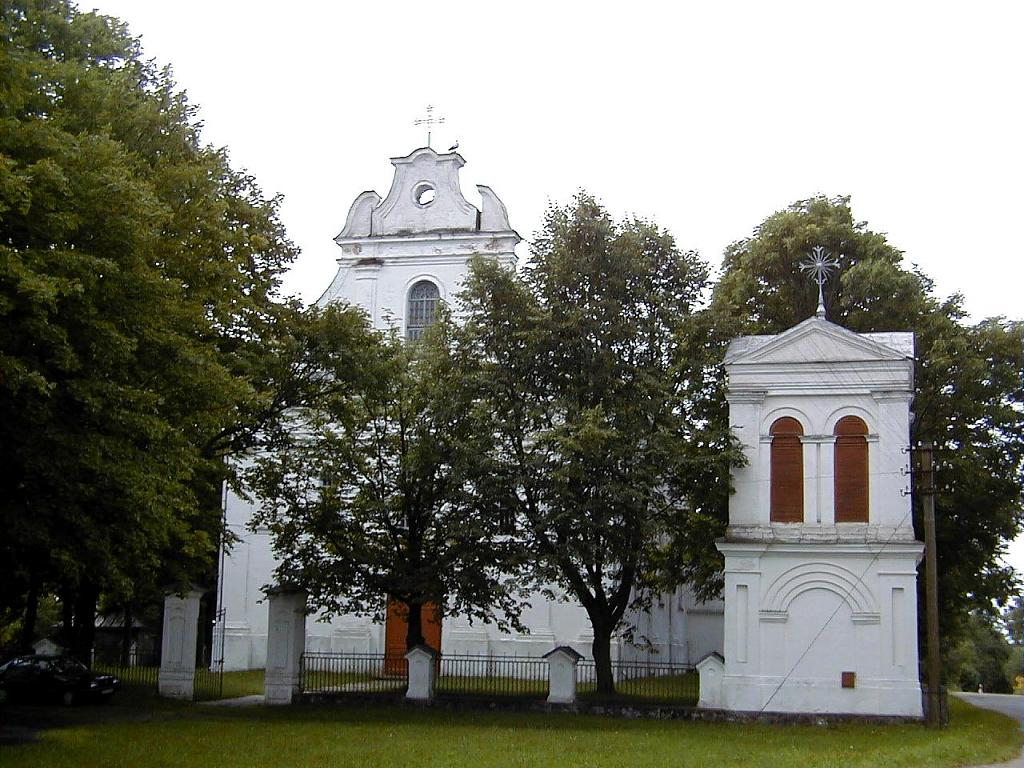 Šķaunes baznīca 2001-08-12